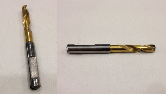 Spiralbohrer aus Hartmetall mit innerer Kühlschmierstoffzufuhr und Whistle Notch-Spannfläche am Bohrerschaft